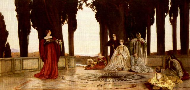 Fiammetta's Song